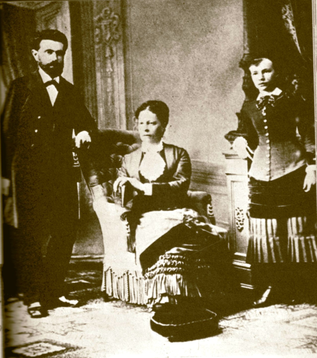 Familie von August Bebel